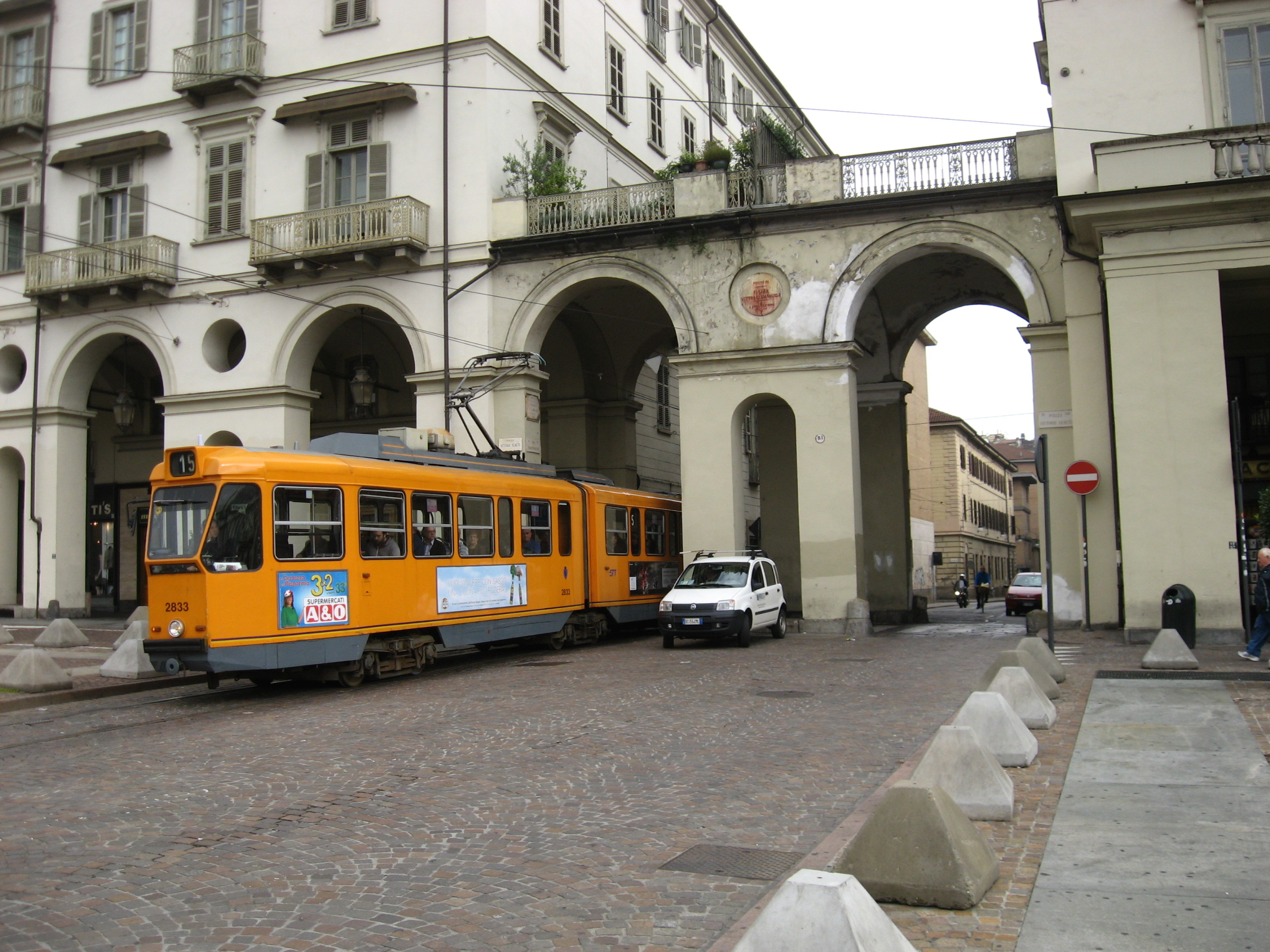 De tram in Turijn in 2009